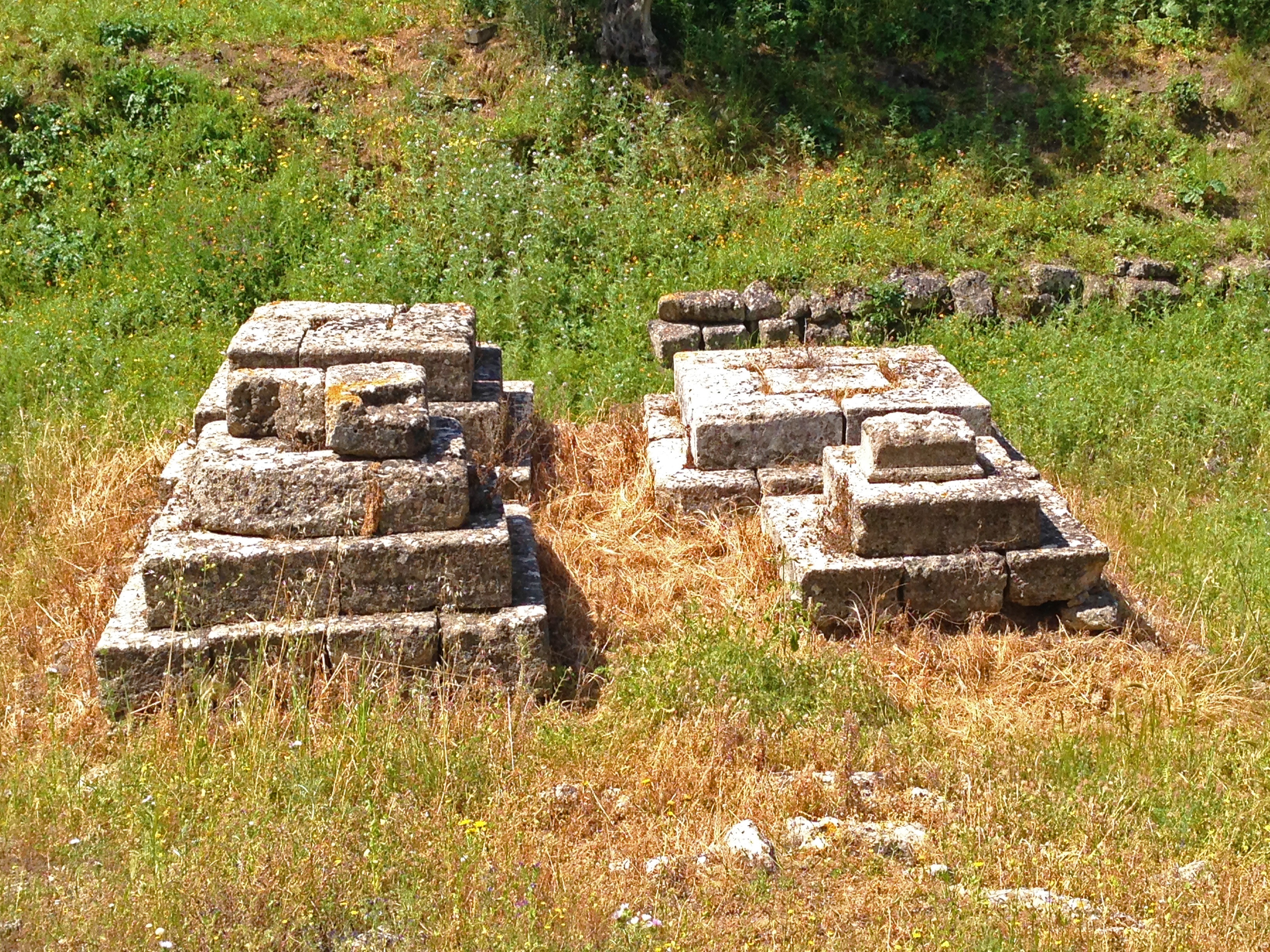 Tombe monumentali ingresso lato sud di Leontinoi